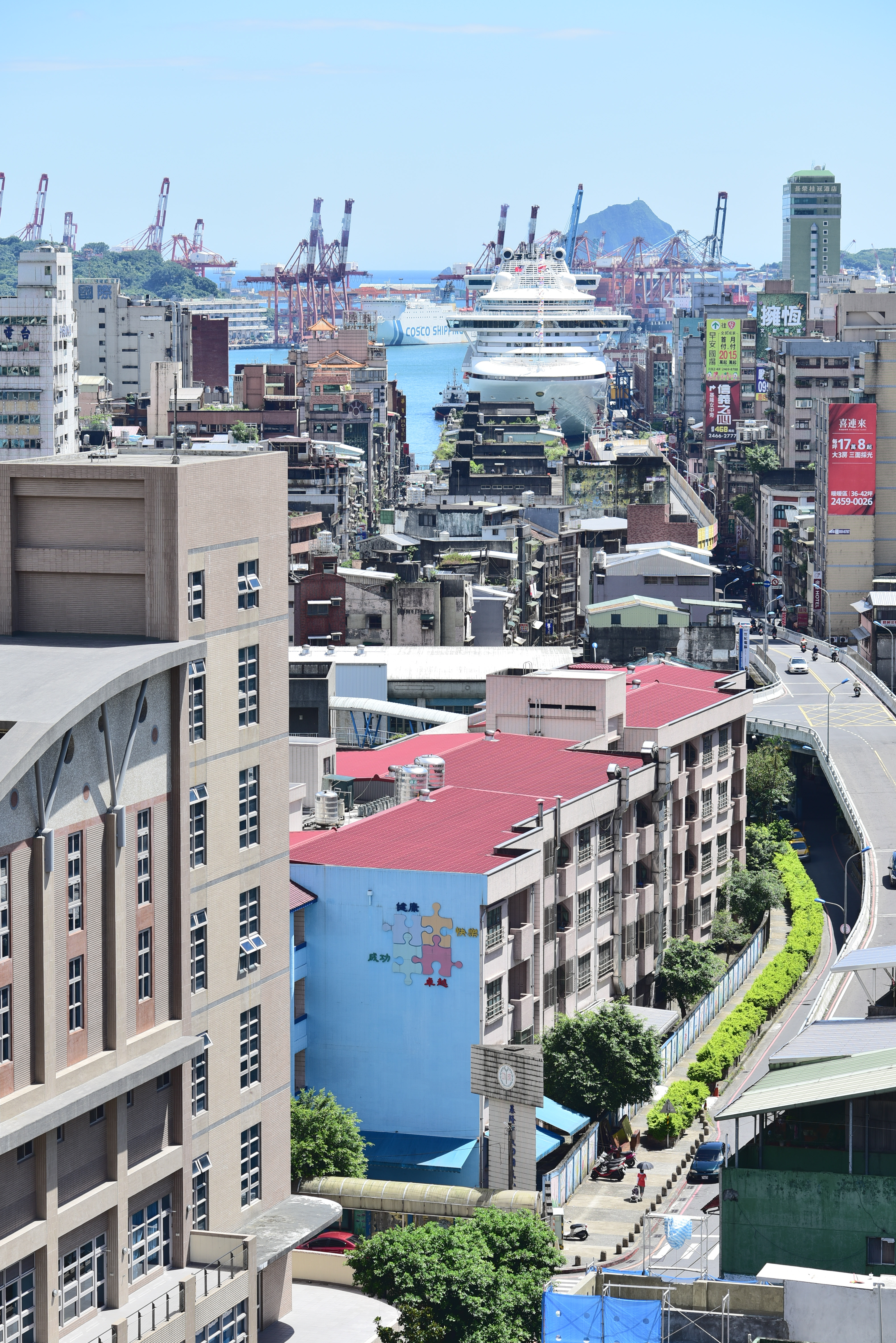 中文（台灣）: 基隆市仁愛區成功國民小學2017